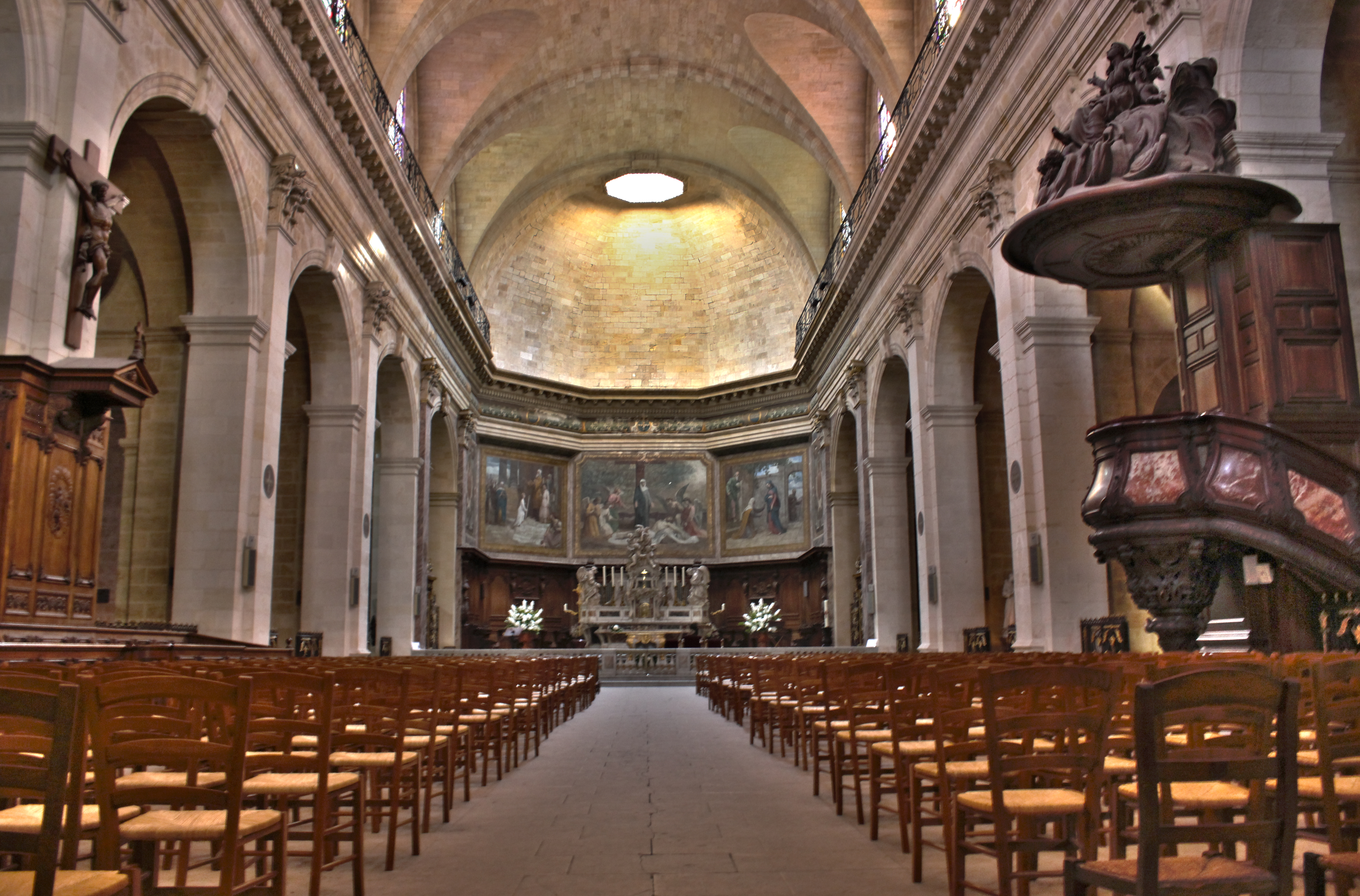 Intérieur